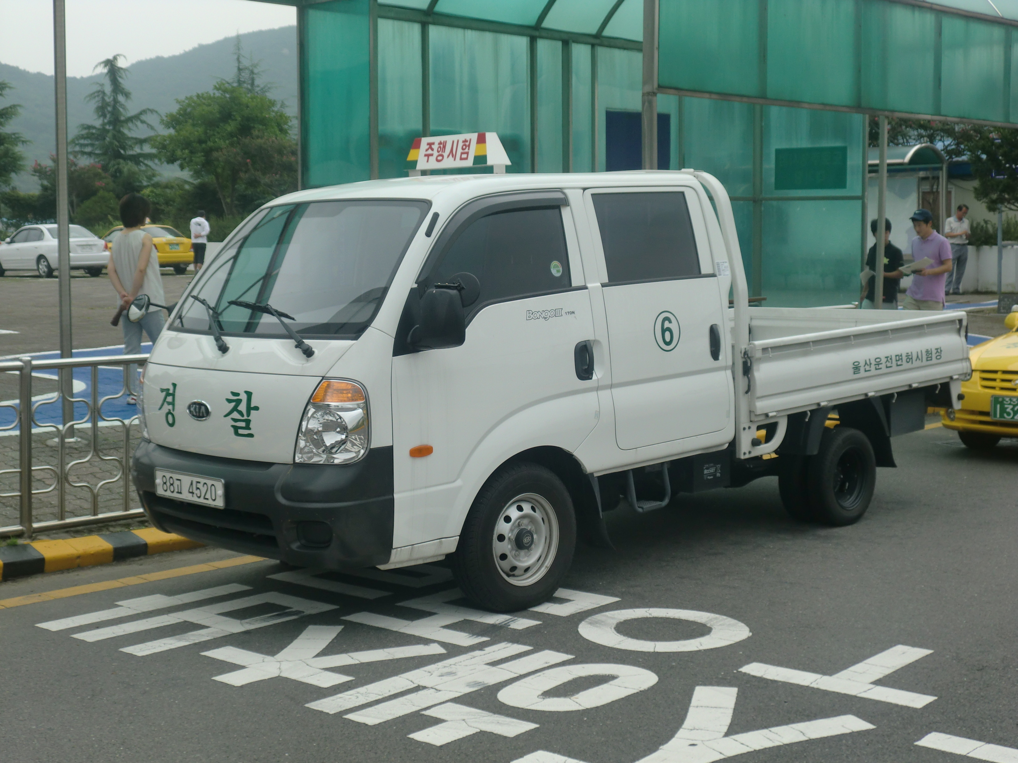 기아 봉고3 도로주행용